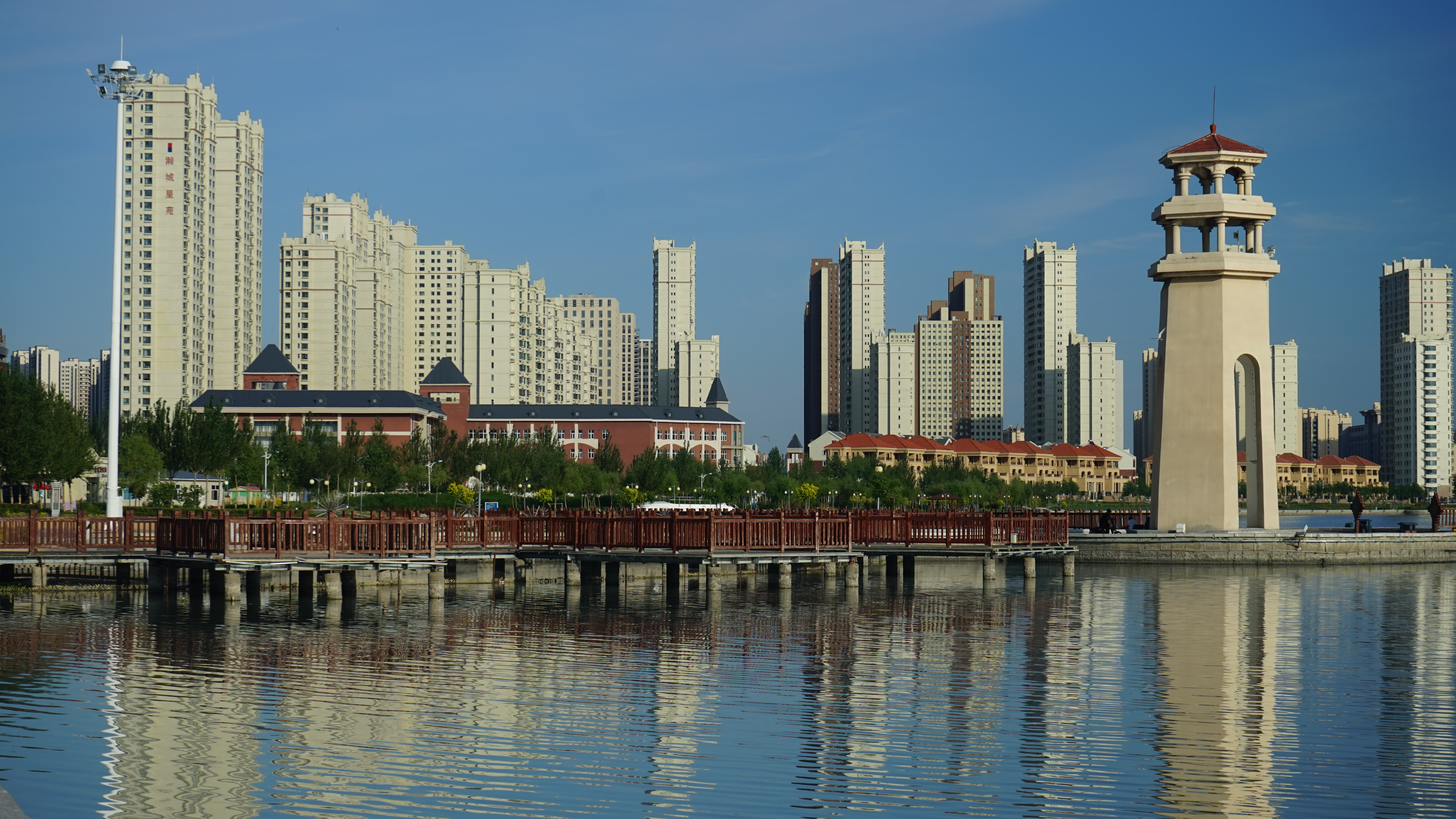 三永湖东面的灯塔及其他建筑